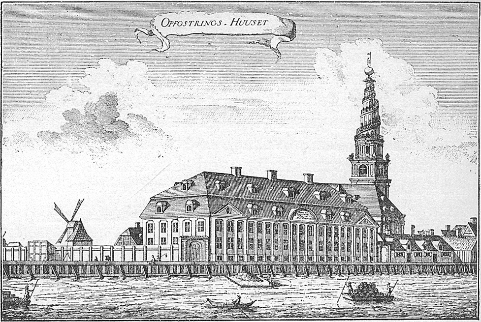 Søkvæsthuset (her i vist som Opfostringshuset på et stik fra 1750'erne). Oprindeligt opført som Opfostringshuset i 1754-1755 af Conradi. I 1775 flyttedes Opfostringshuset til Store Kongensgade og bygningen blev indrettet til Søkvæsthus (Hospital for Flådens folk). Senere indrettet til kaserne og kontorer for marinen.